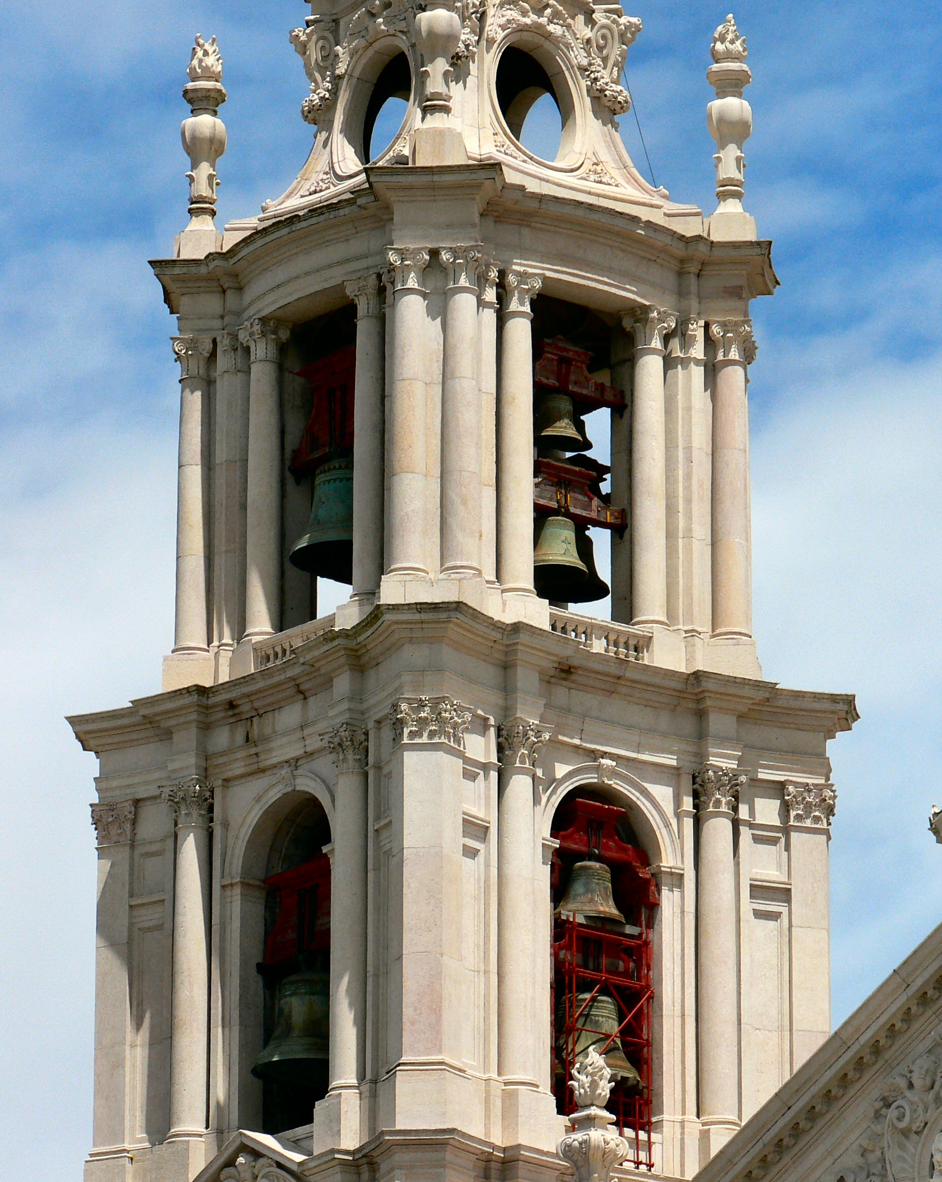 Palácio Nacional de Mafra em Mafra - Carillon tower